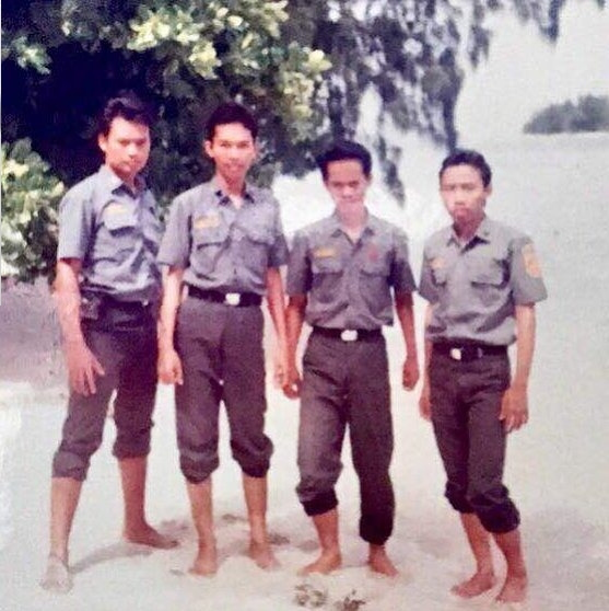 Rofik Hananto bersama temannya saat studi di STAN